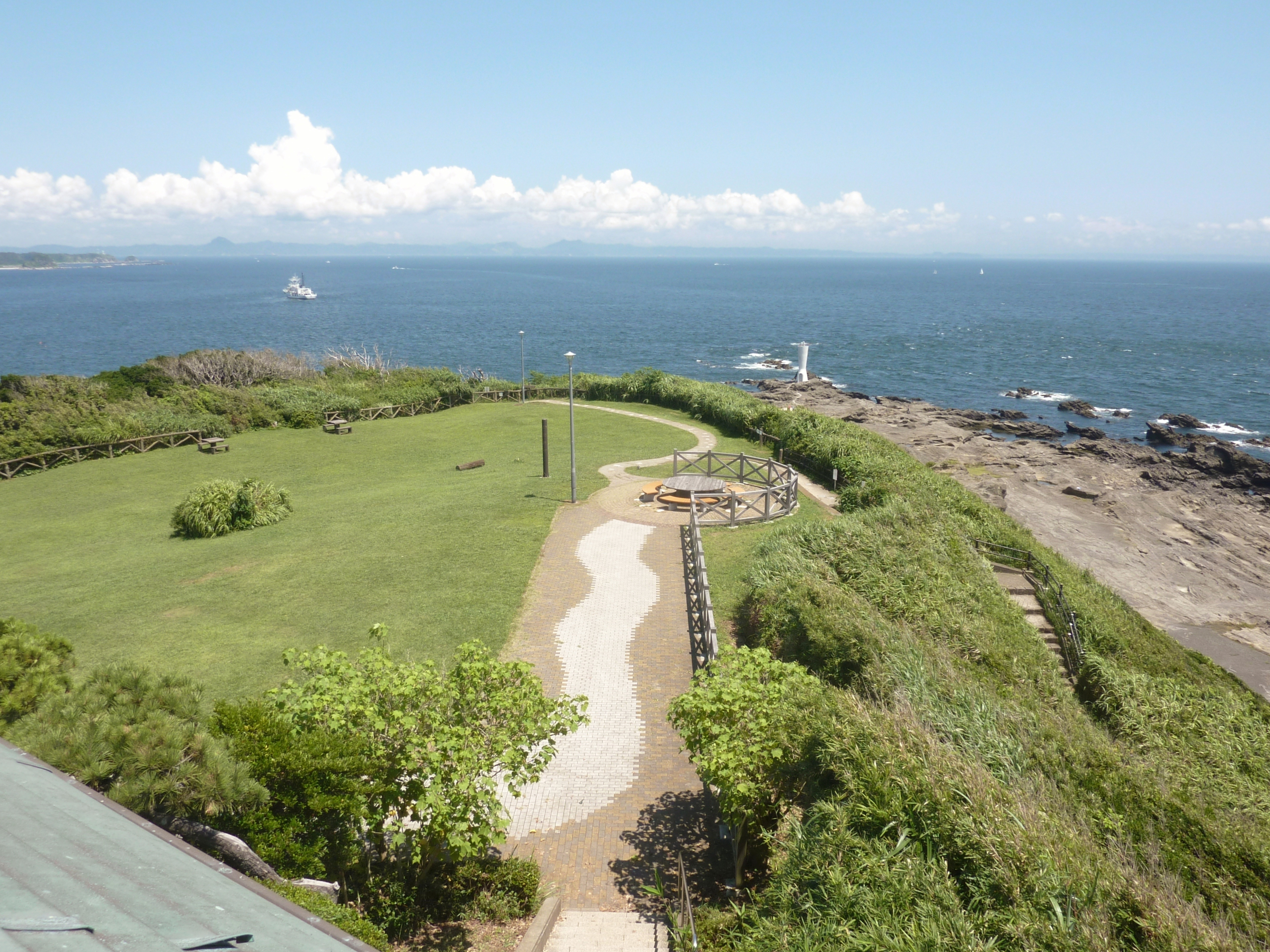 城ヶ島公園の第一展望台から安房崎突端を臨む（神奈川県三浦市）